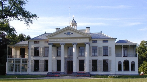 Foto komt van de website van Eyckenstein ( De beheerder van deze website heeft de foto op Wikipedia geplaatst. Categorie:Afbeelding monument